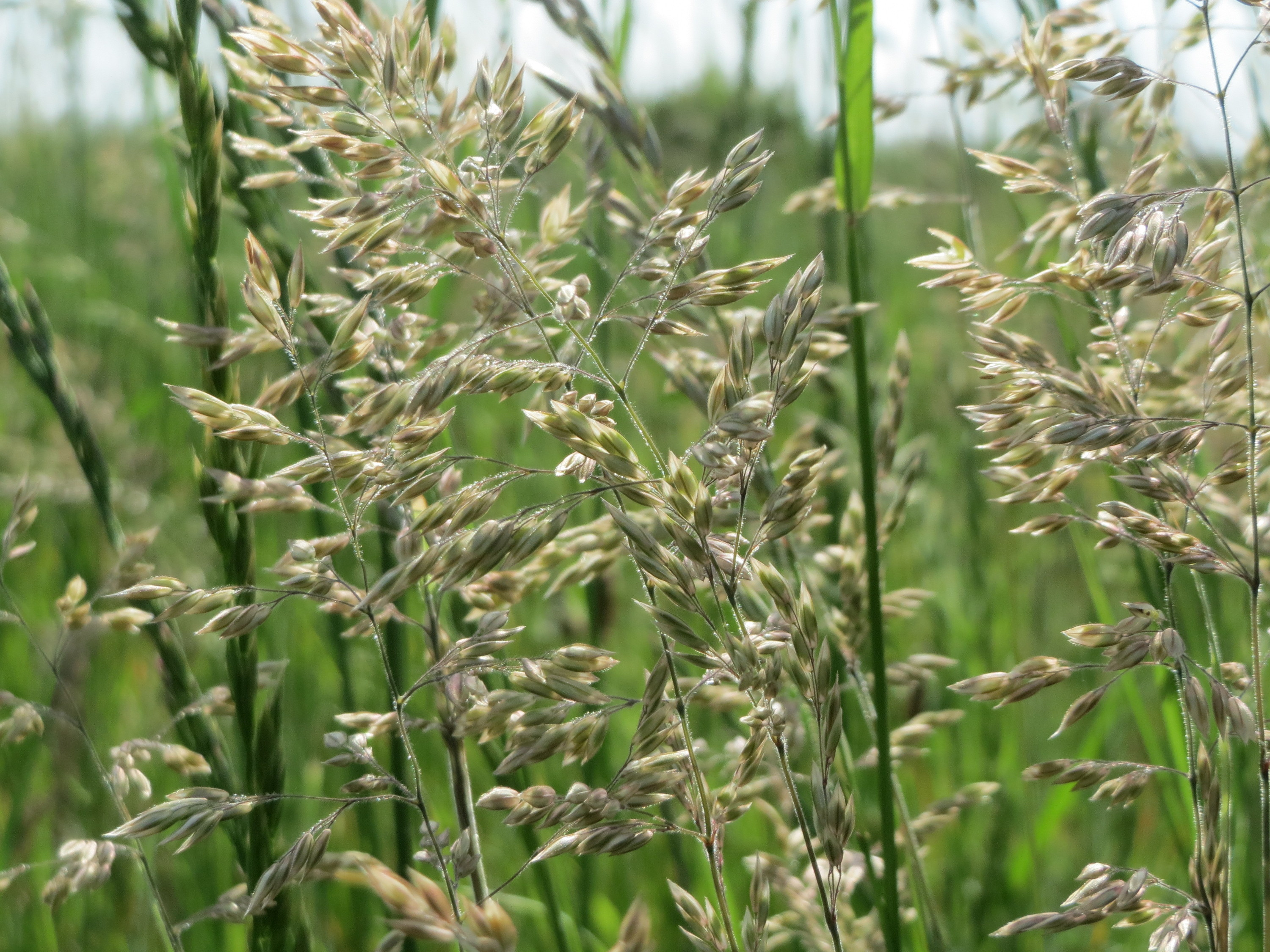 Wiesen-Rispengras (Poa pratensis) in Hockenheim